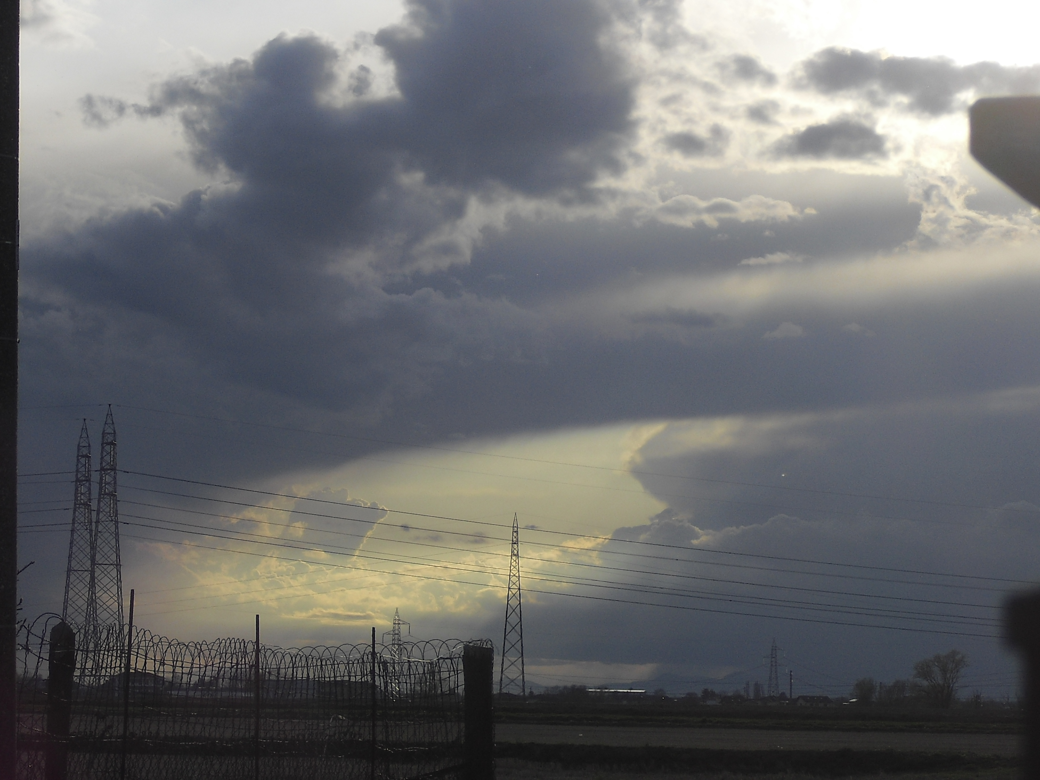 un temporale (cumulonembo) in formazione